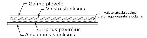 Fentanilio pleistras